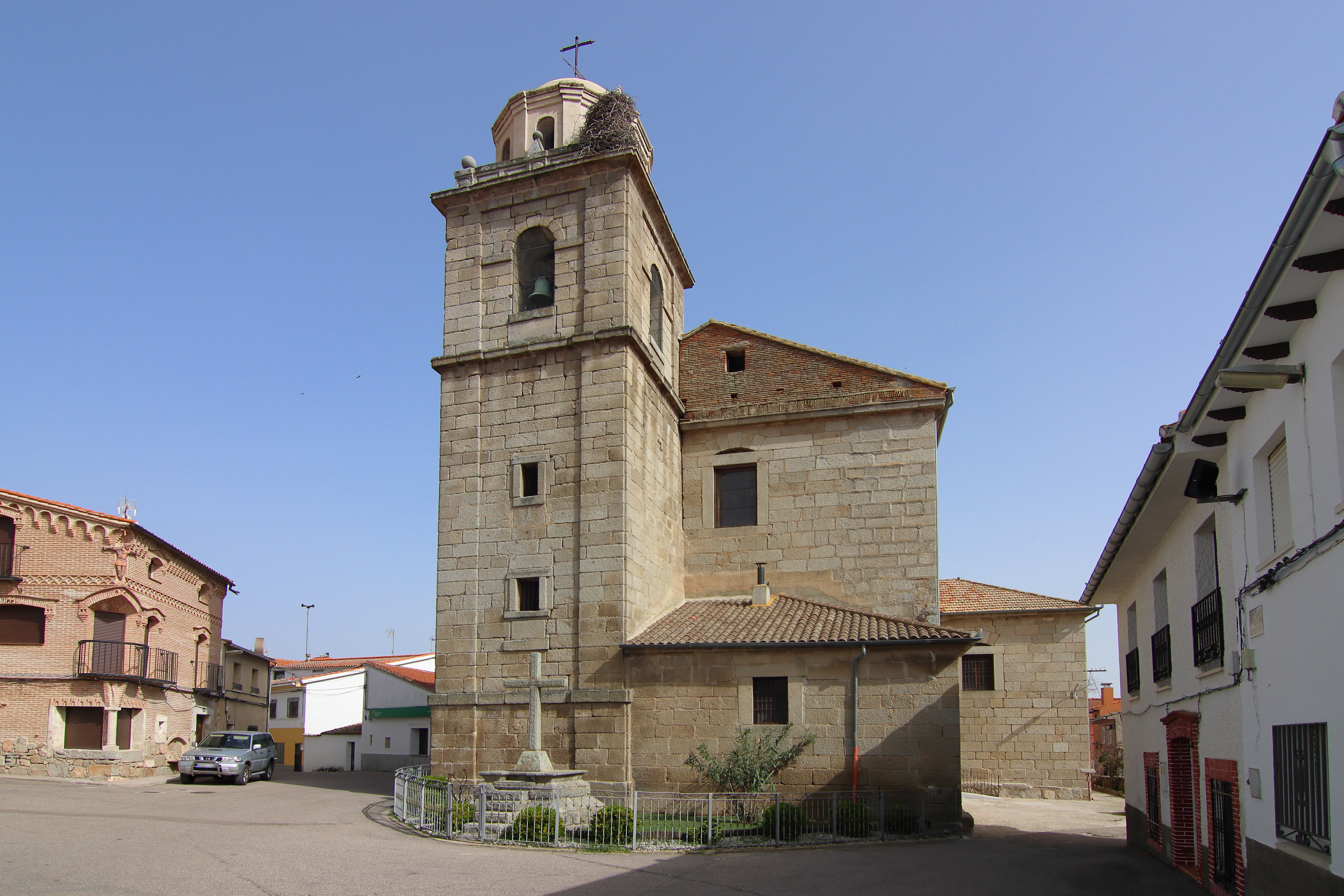 Iglesia de San Andrés, Pelahustán, fachada oeste y torre